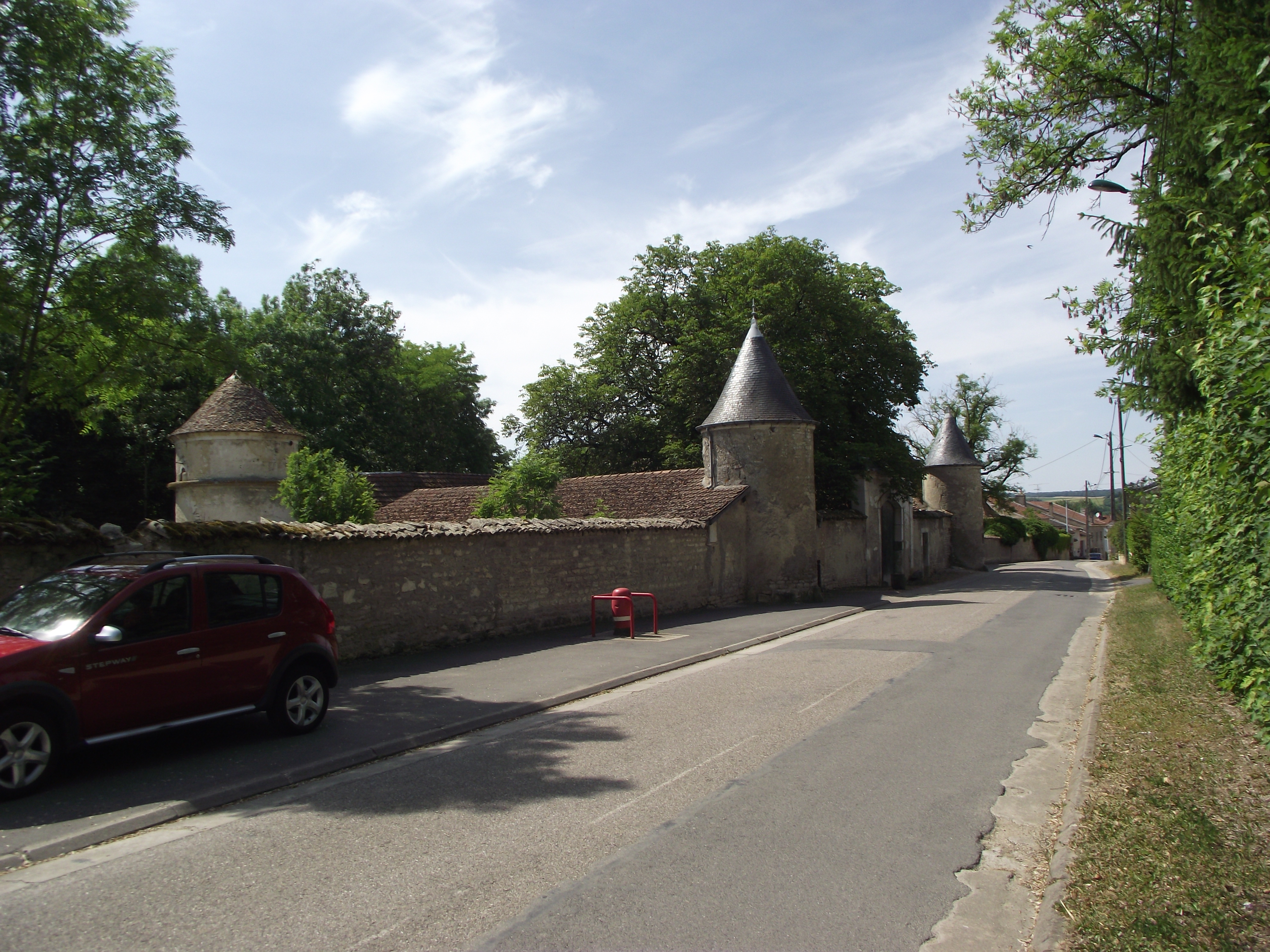 Vue depuis la route du château de Calaines.